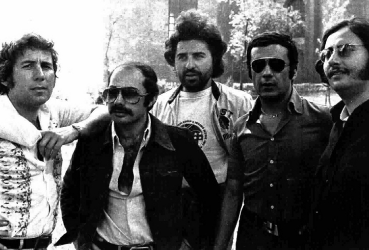 Italian band Dik Dik